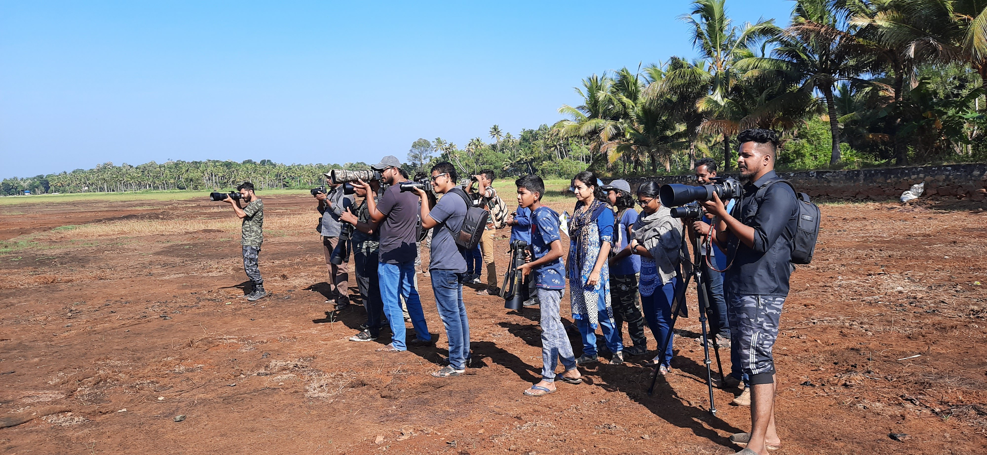 അനുമതി